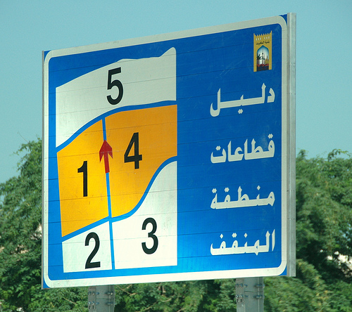 التوزيع الإداري للمنقف